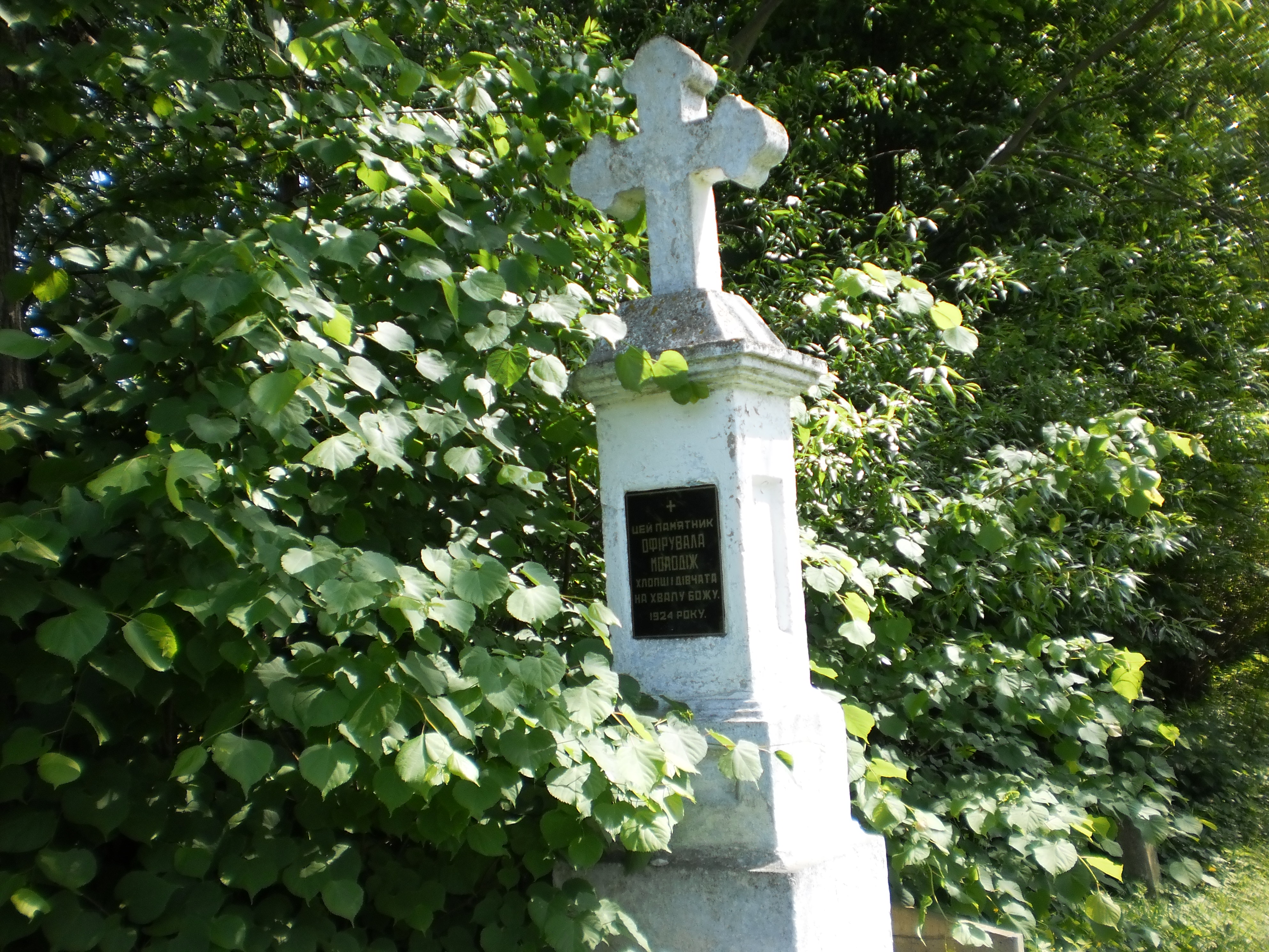 Фото №11. Пям’ятний Хрест 1924р. Старе Село. 2017рік.